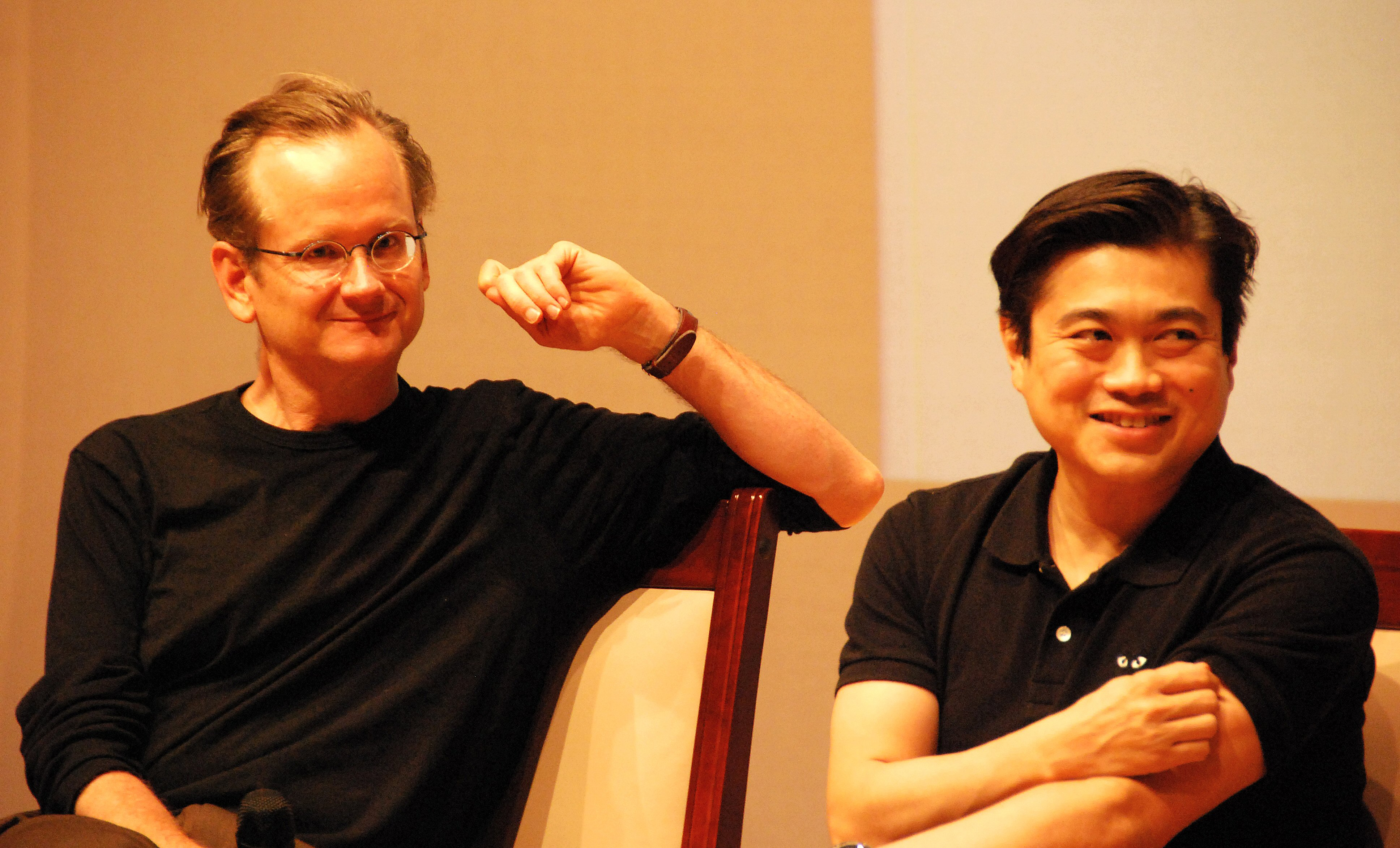 blogged